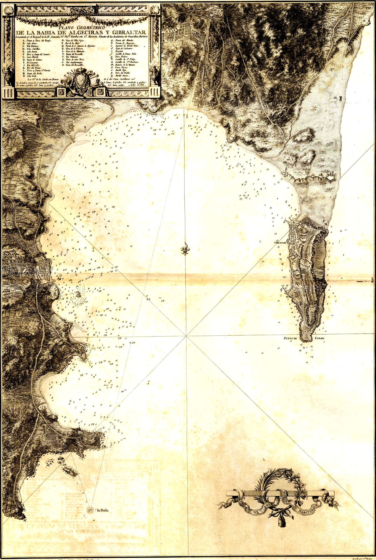 Plano geométrico de la bahía de Algeciras y Gibraltar. Levantado por el Brigadier de la Real Armada Vicente Tofiño de San Miguel. Director de las Academias de Guardias Marinas. Año 1786. Conservado en la Biblioteca Nacional (de España): a. Fuerte del Mirador b. Puente de Mayorga c. Quartel de Buena Vista d. Vigia de Carbonera e. Hospital f. Castillo de Punta Mala g. Torre Pedrosa h. Castillo de San Felipe i. Castillo de Santa Bárbara m. Batería de la Tunara n. Torre Nueva o. Muelle Viejo p. Torre del Diablo q. Muelle Nuevo